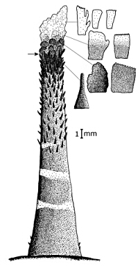 Mental barbel (dorsal view) of Turquoise plunderfish Pogonophryne tronio Shandikov, Eakin et Usachev, 2013, holotype, male, 290 mm TL, 234 mm SL, Ross Sea, Antarctica